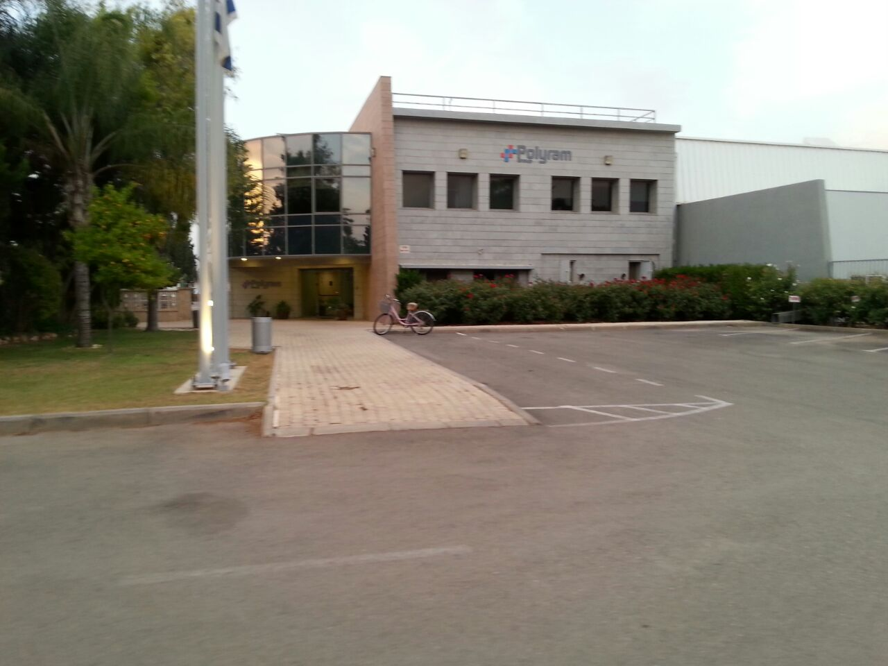 המפעל מבחוץ